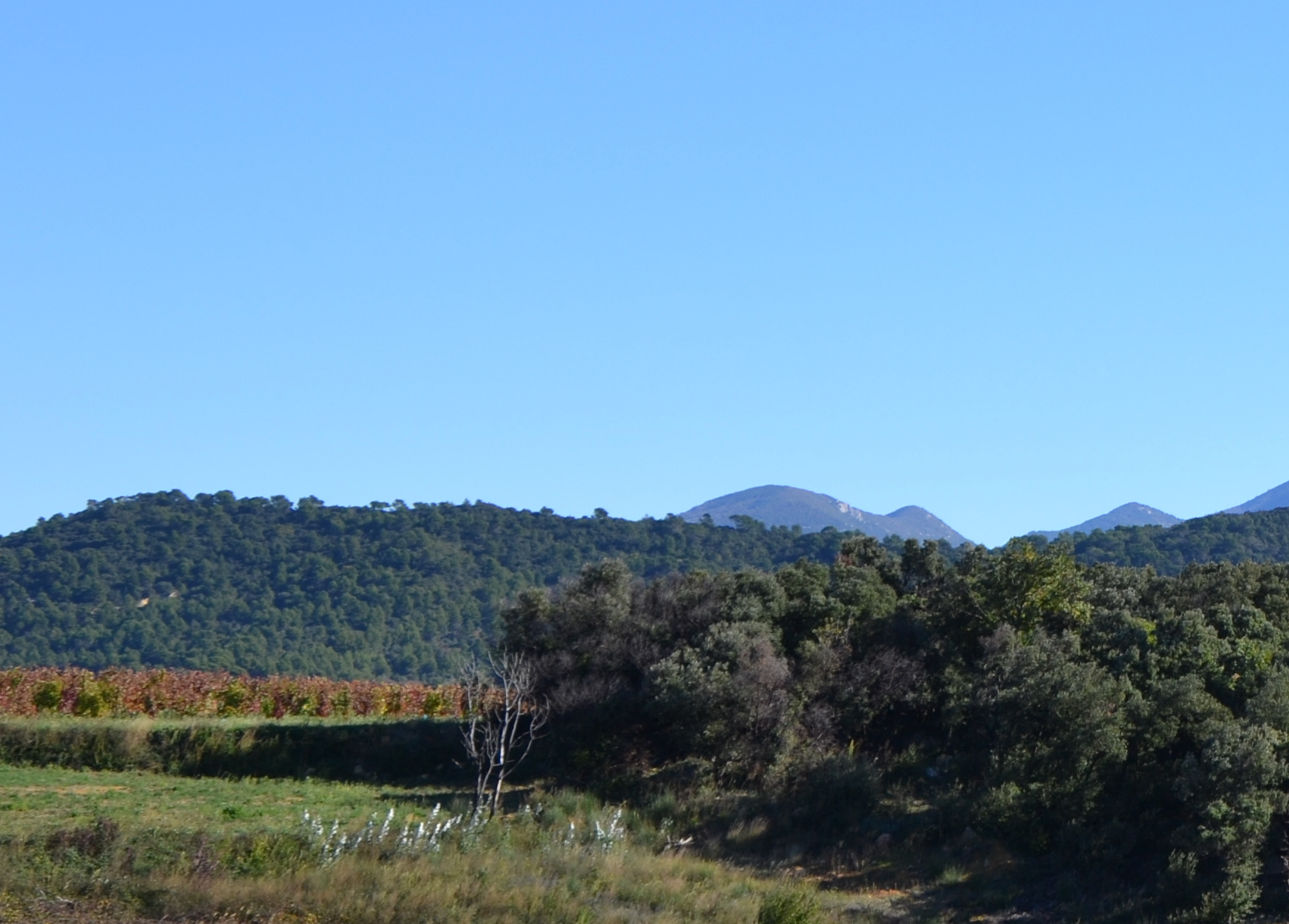 vue vers l'oppidum de Clarier